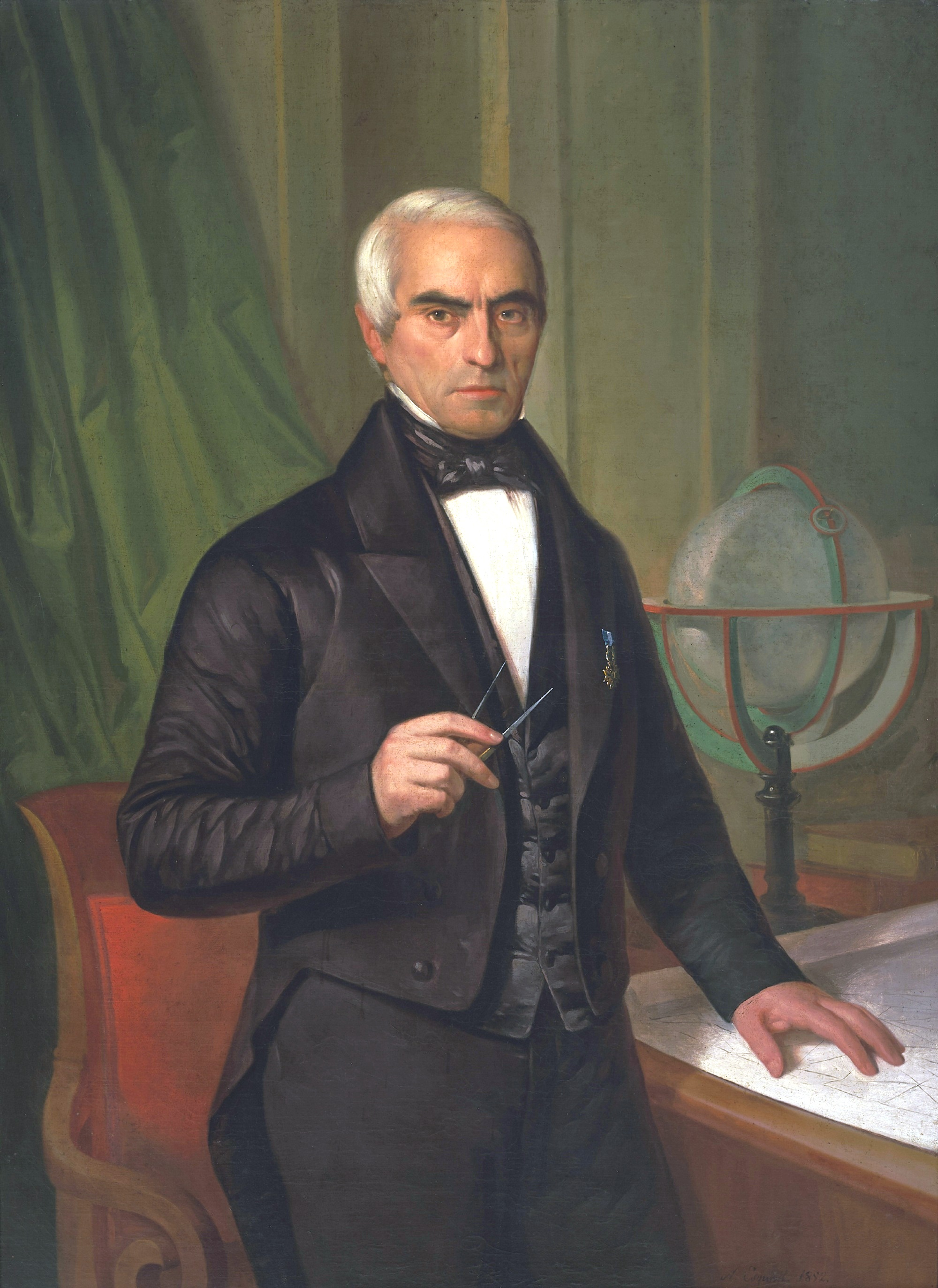 Retrato de Domingo Fontán, en la Sala de Juntas de la Facultad de Geografía e Historia de la Universidad de Santiago de Compostela.